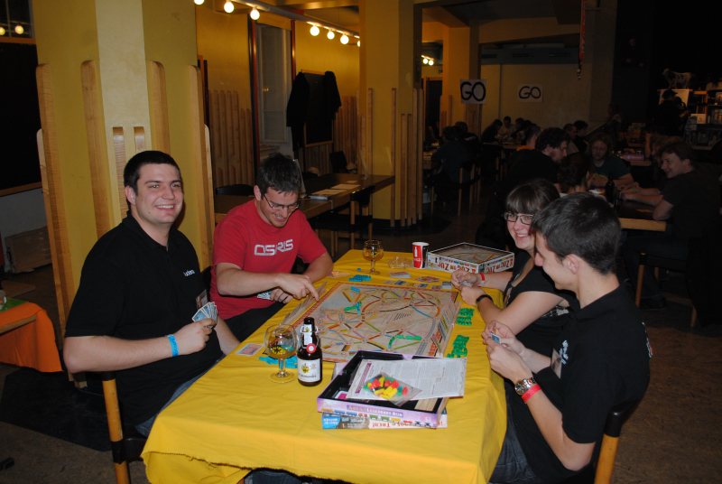 Finale des aventuriers du rail par équipe ! Les vainqueurs c'est les verts !